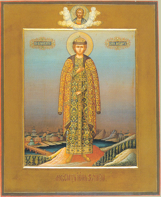 Святой благоверный князь Фёдор Ярославич. Икона месячной минеи. (Государственный Эрмитаж)